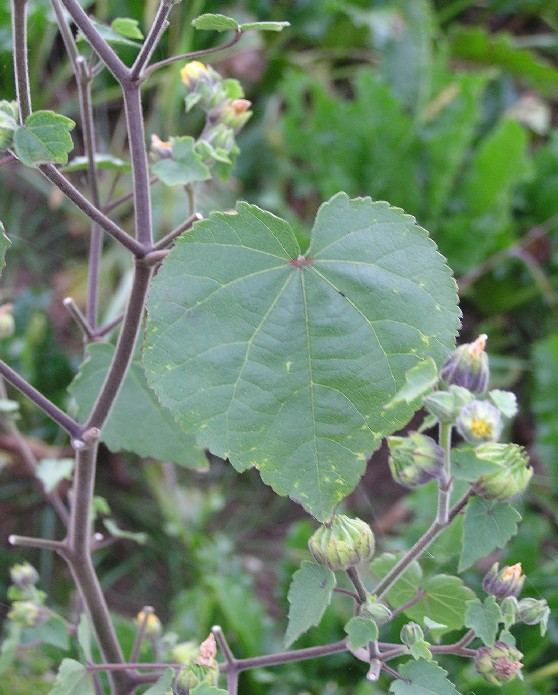 Blatt von Abutilon theophrasti auf einem Rübenacker bei Neuss.